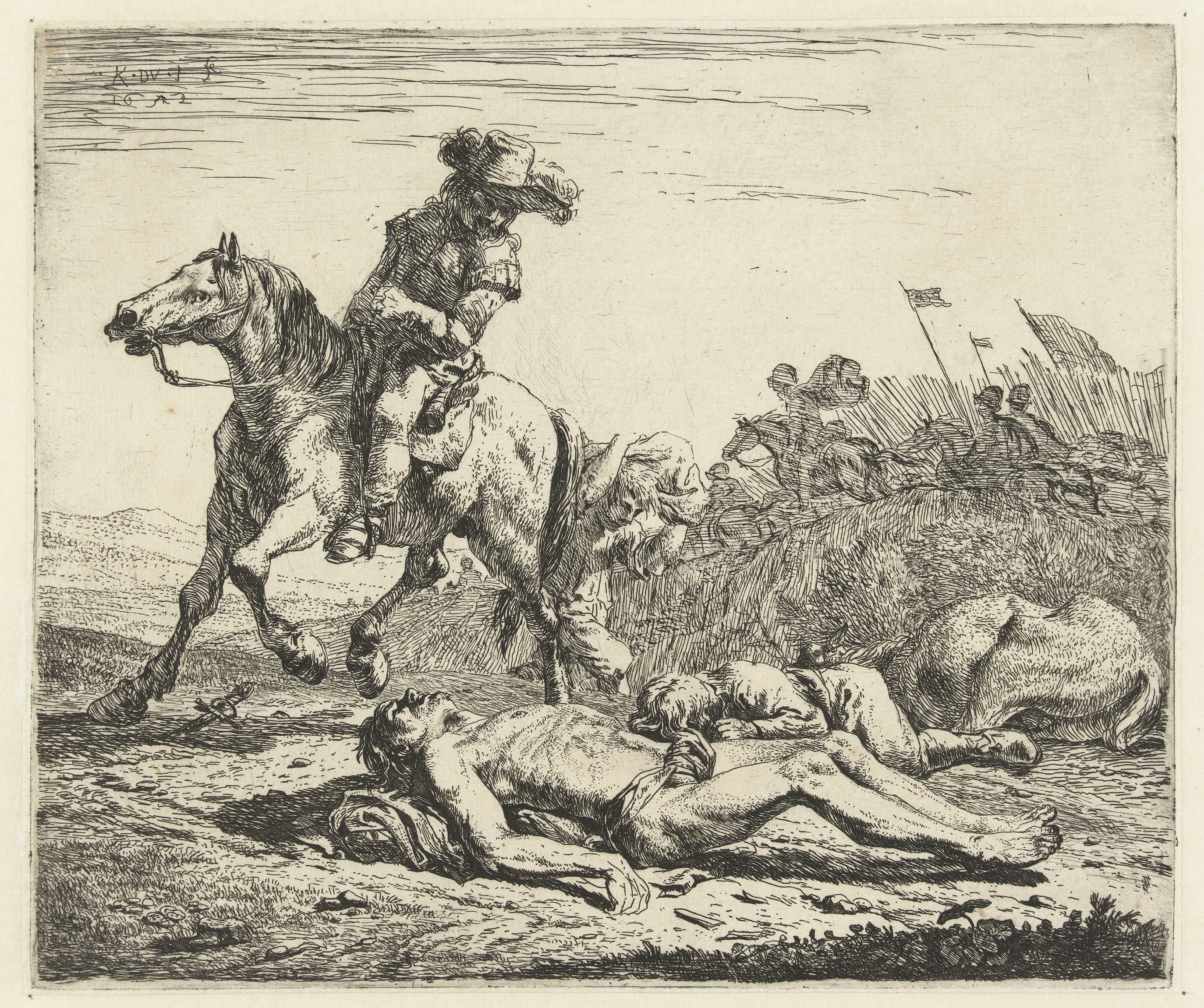 Das Schlachtfeld - The Battlefield - Le Champ de Bataille 1652